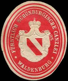 Sealing stamp Title: Fürstlich Schönburgische Canzlei Waldenburg Description: Briefsiegel, rot, weiß, geprägt Place: Waldenburg size: 4x3 cm